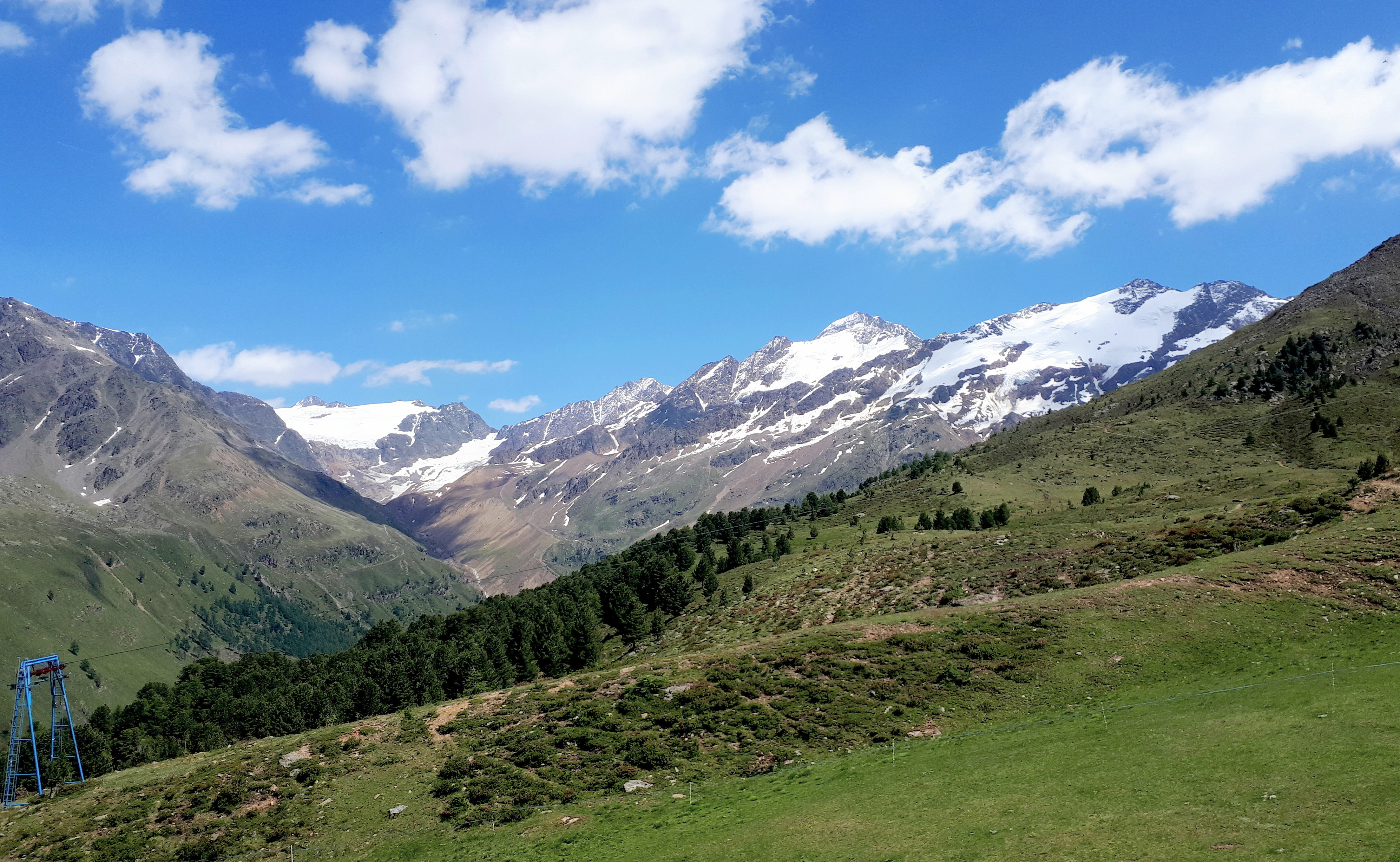 Blick von der Bergstation Maseben zu den Ötztaler Alpen (Bärenbartkogel, Rotkopf und Rotebenkopf)